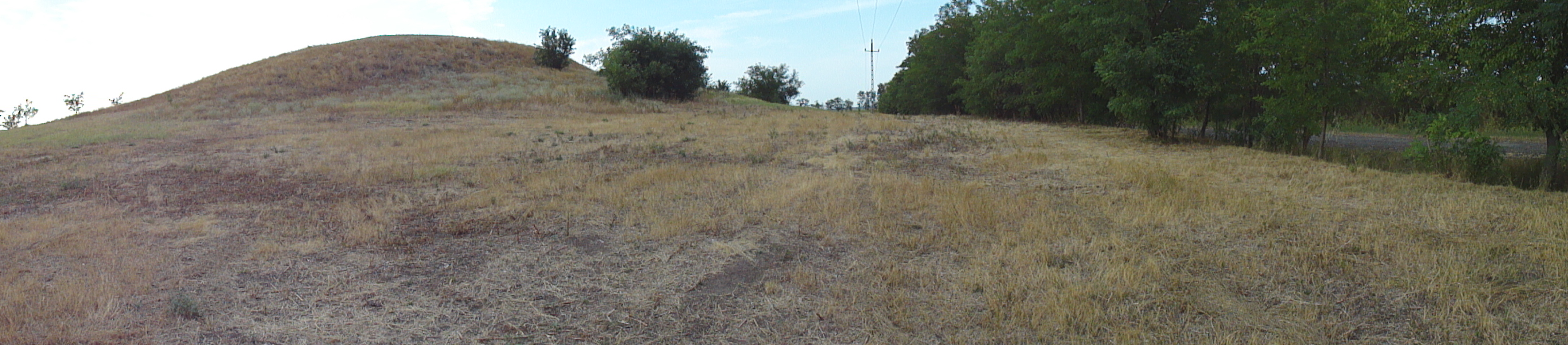 Gödény-halom (panoráma)